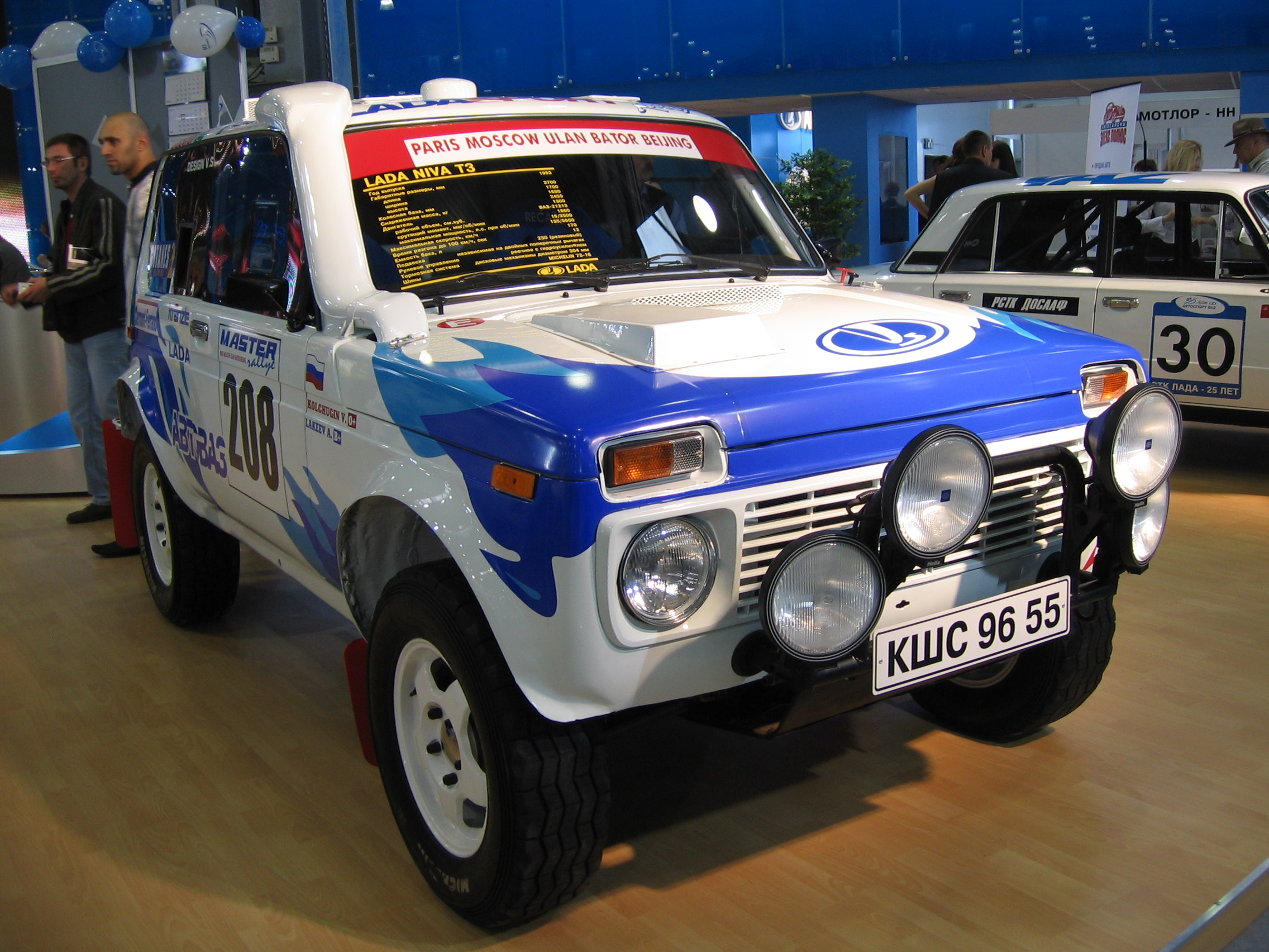 lada niva T3 rally mims